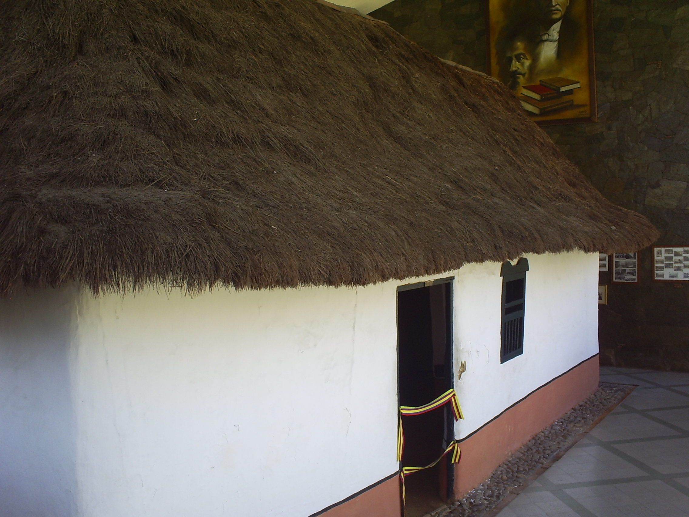 Choza de Marco Fidel Suárez. Bello, Colombia.